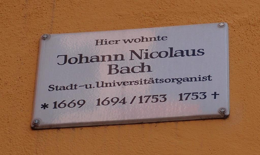 Plakette für den Komponisten Johann Nicolaus Bach (1669-1753) in Jena, Jenergasse 6